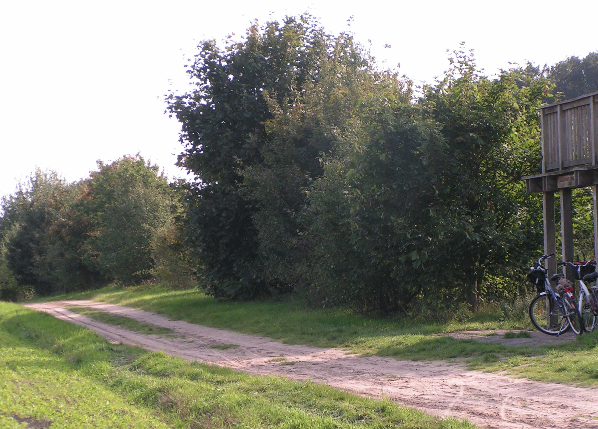 Pickerweg im Bereich Hamberg (Lohne) mit Aussichtsplattform (Blick ins Brägeler und Südlohner Moor)